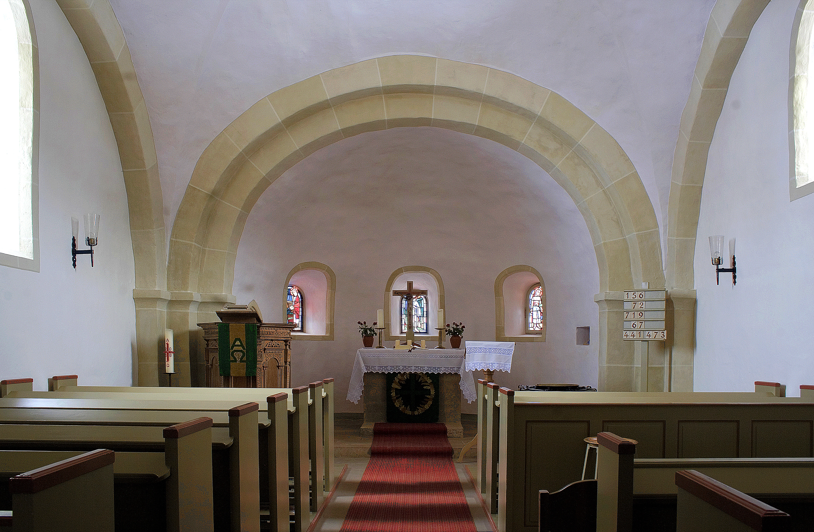 Romanische St.-Georg-Kirche in Schweinsbühl, Innenraum